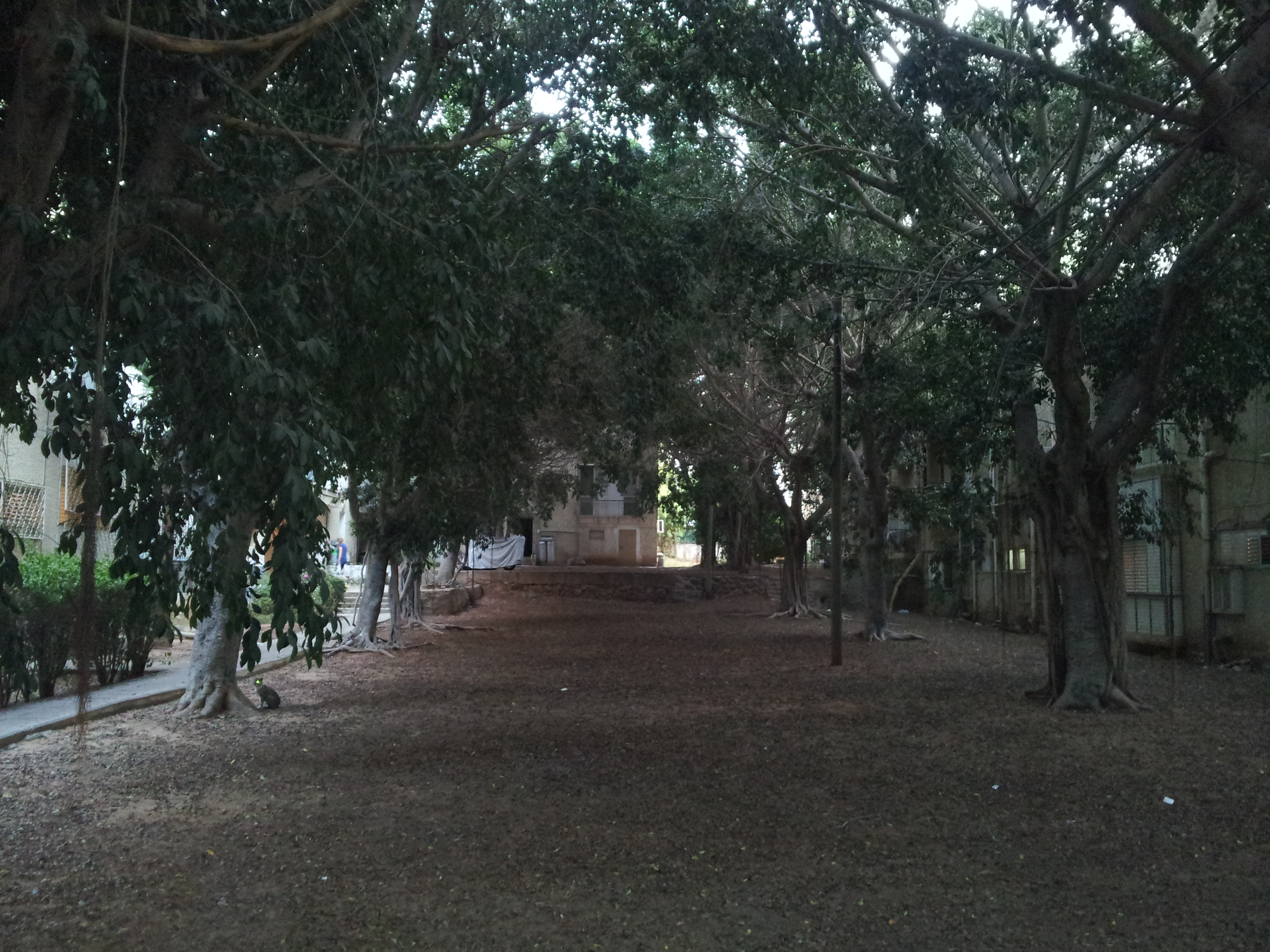 מתחם לביא - מעונות הפועלים